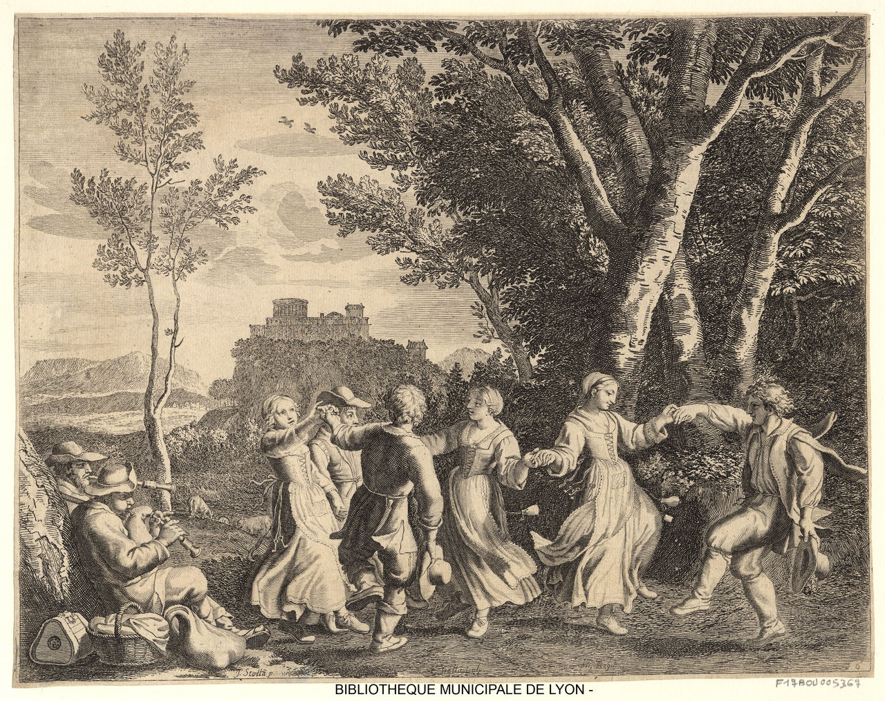 Le branle de Bouzonnet-Stella, Claudine, 1641-1697 Technique : taille-douce ; eau-forte ; burin